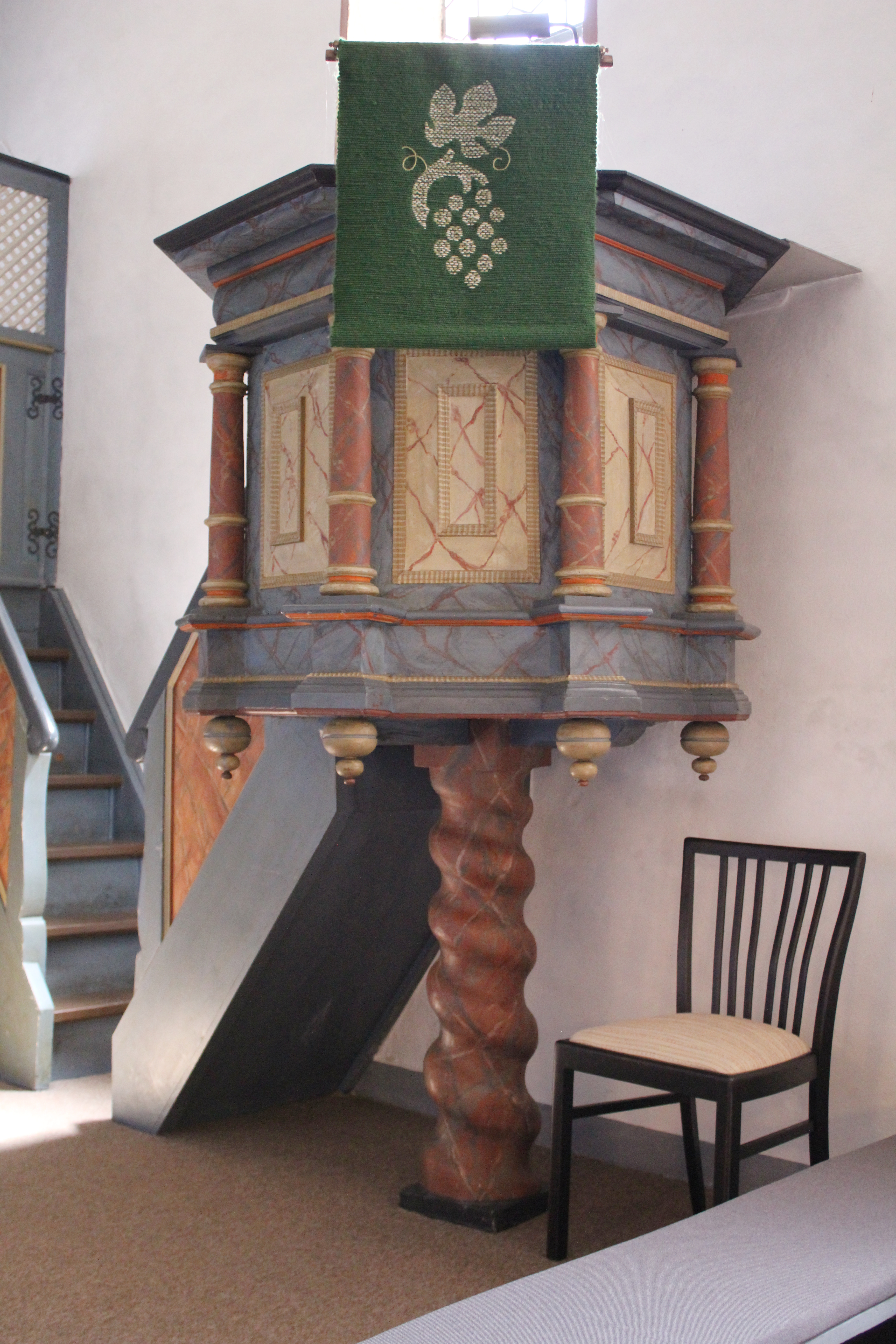 Evangelische Kirche Oberquembach, Gemeinde Schöffengrund, Hessen, Deutschland